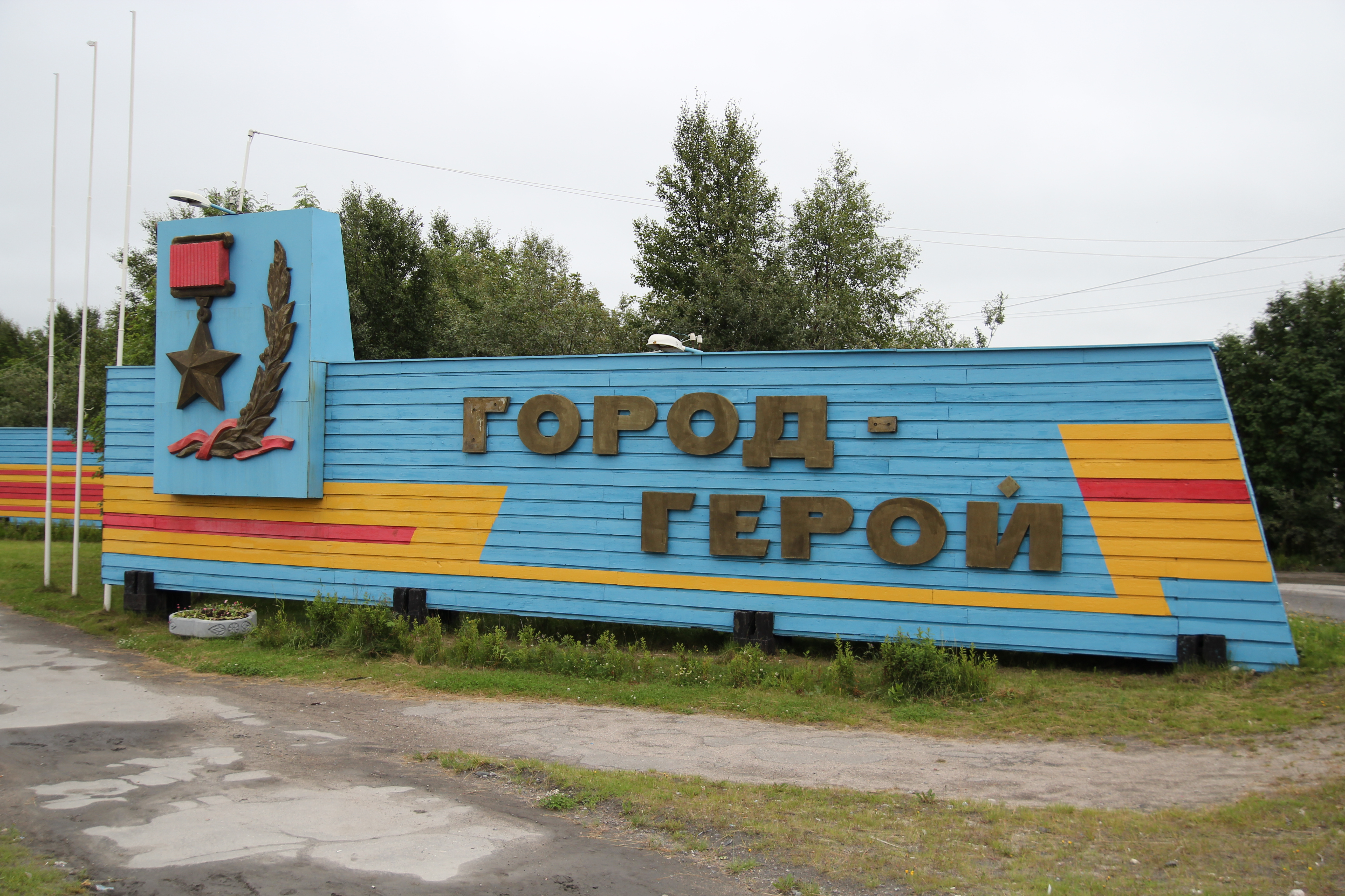 Въезд в город (Город-герой)